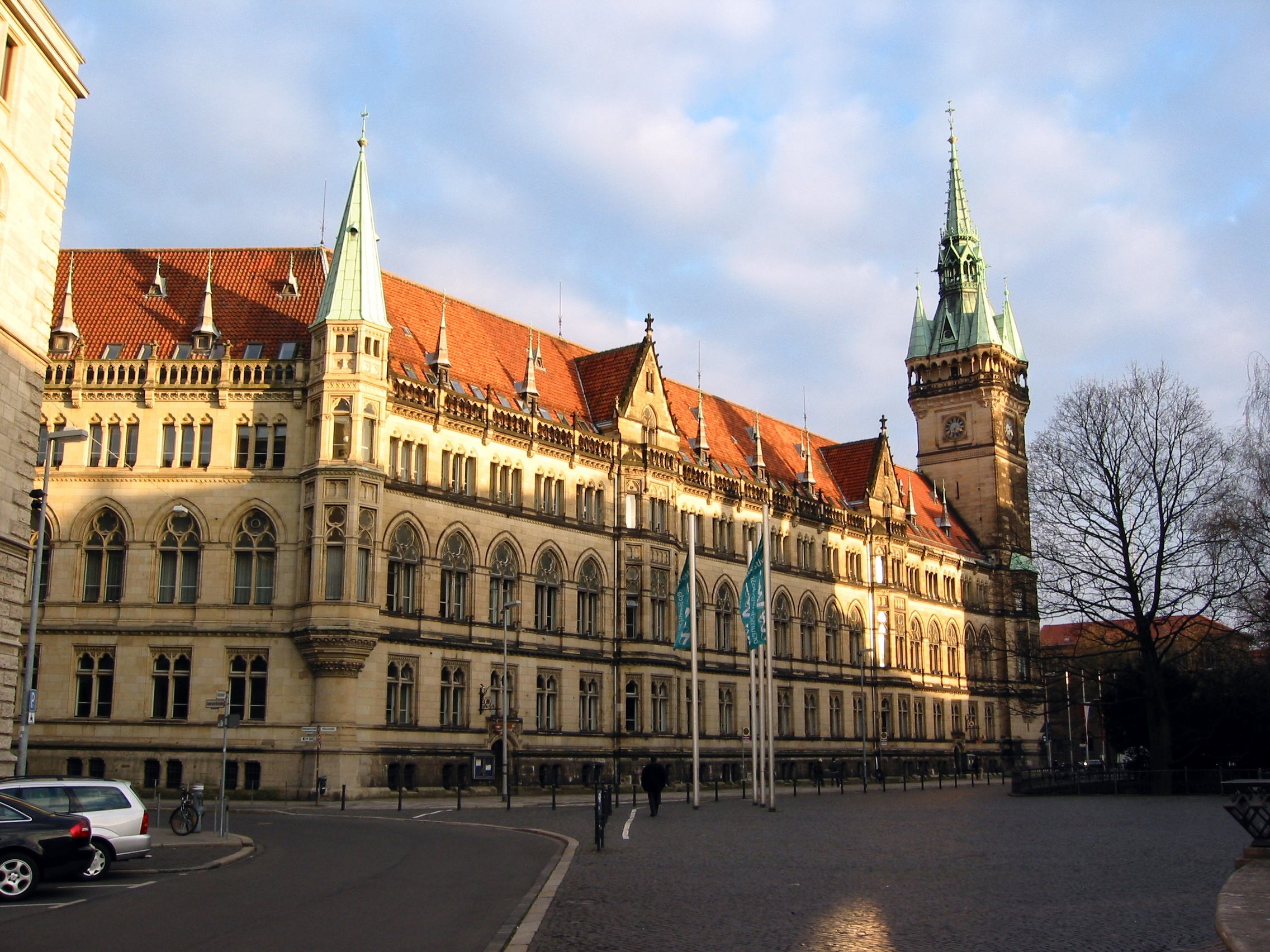 Braunschweig, Rathaus